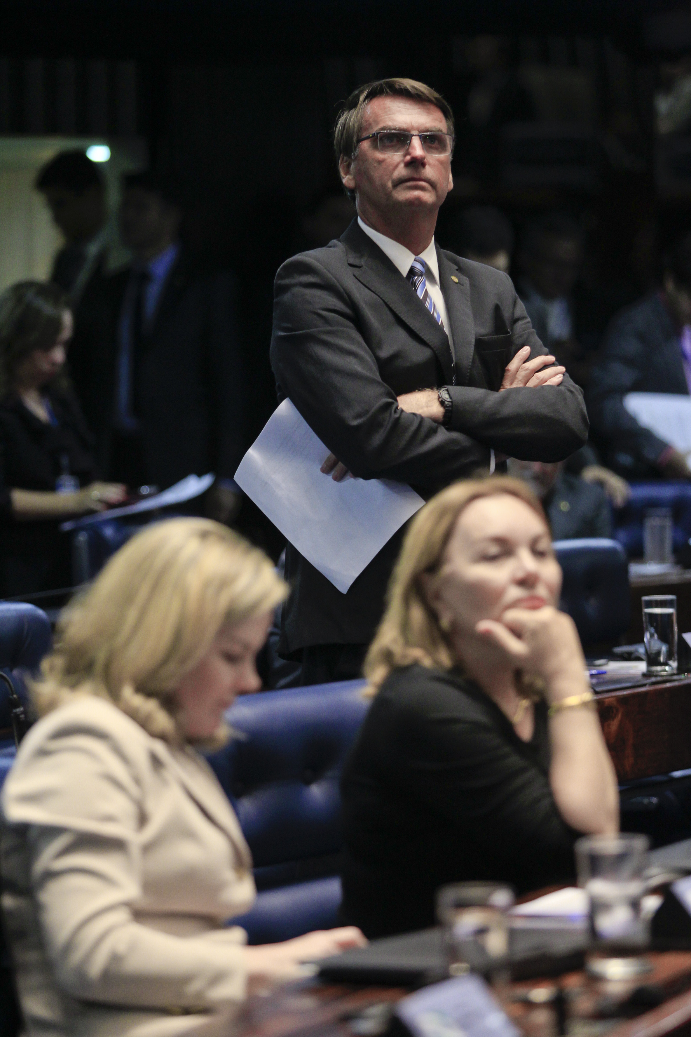 Plenário do Senado durante sessão deliberativa ordinária. De pé, deputador Jair Bolsonaro (PP-RJ) assiste à sessão. Foto: Beto Barata/Agência Senado